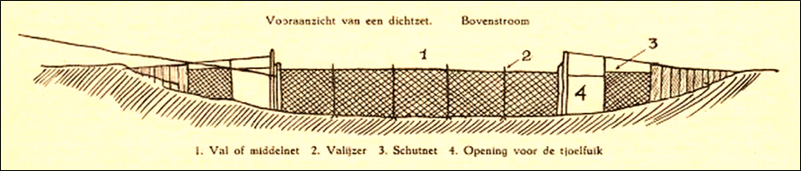 de dichtzet bestaat uit een middelnet en twee schutnetten; de valijzers van het middelnet zorgen ervoor dat het net plat op de bodem komt te liggen als er een schip doorvaart.